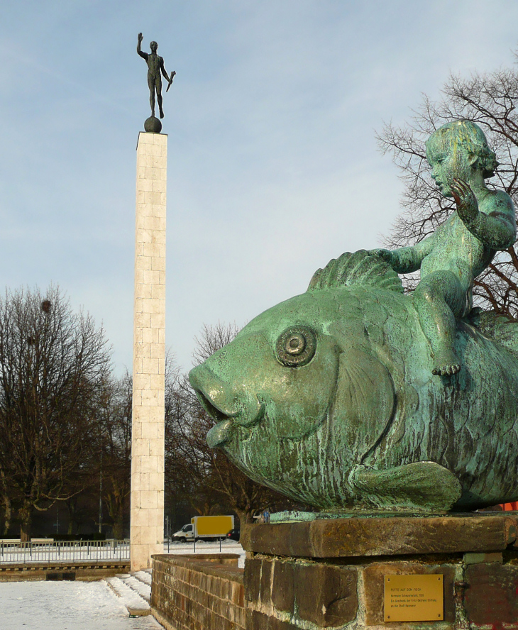 Bronzeplastik des olympischen Fackelträgers am Maschsee